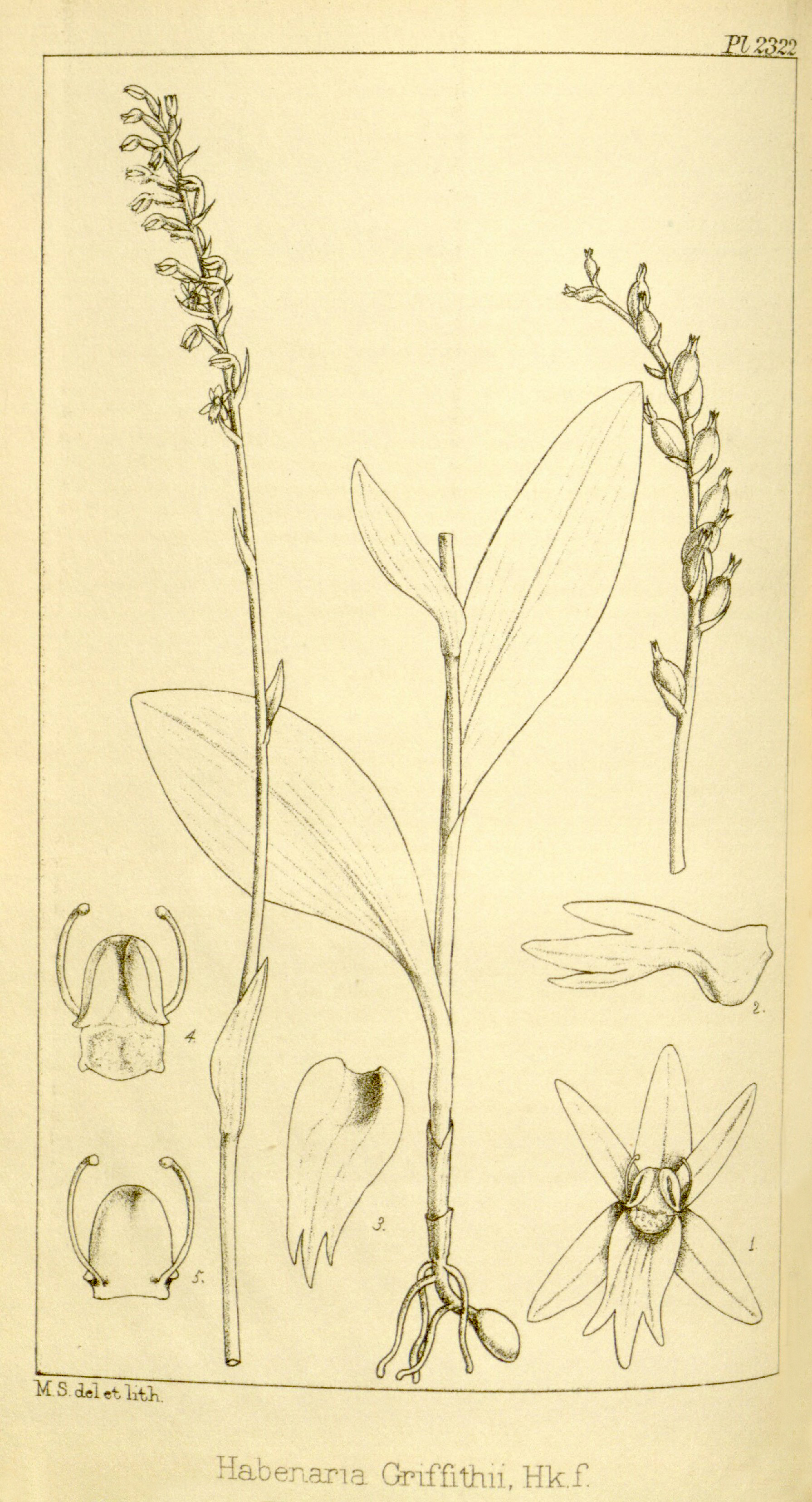 Illustration of Gennaria griffithii (syn. Diphylax griffithii) as Habenaria griffithii